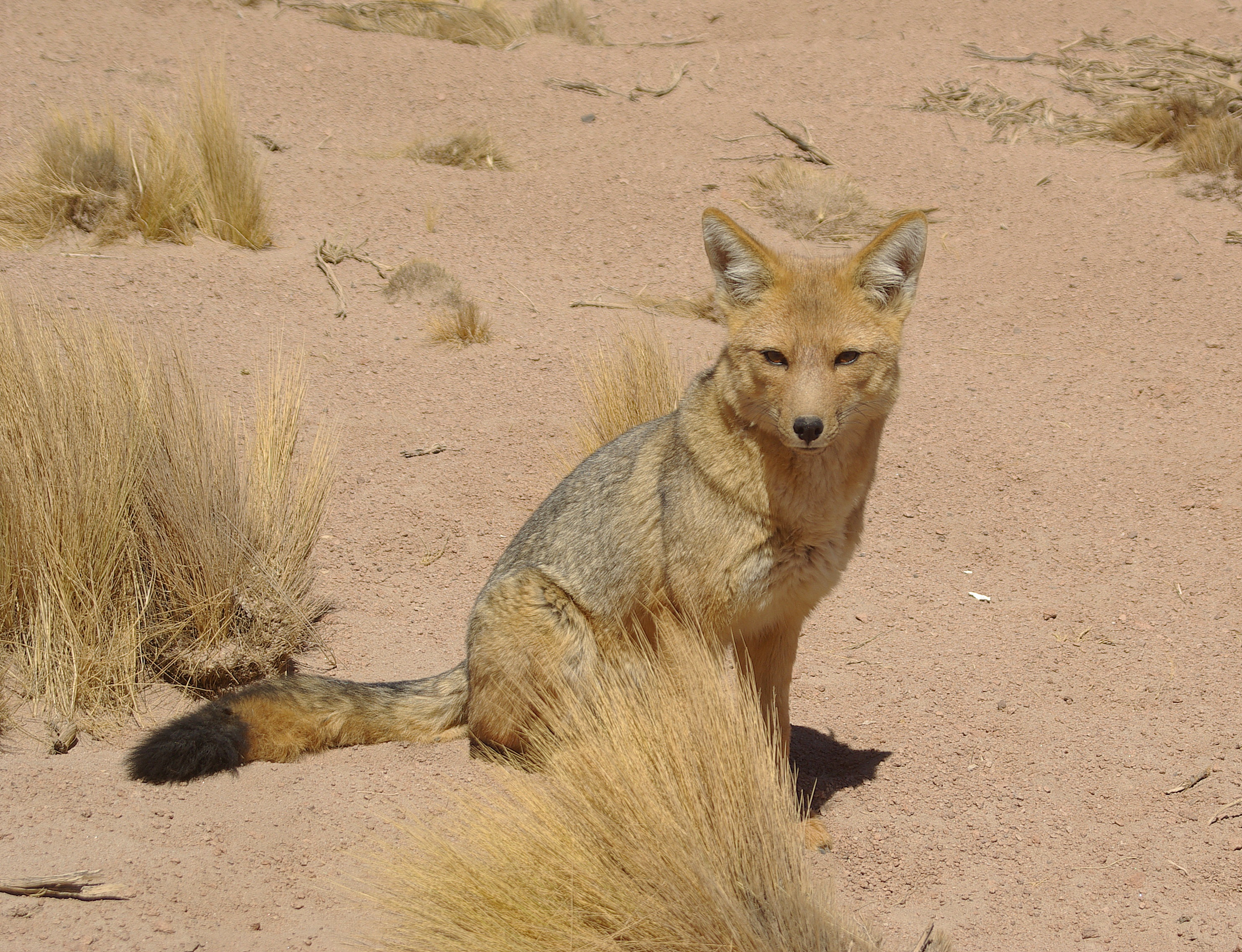 Culpeo, camino de Socaire a laguna Chaxa